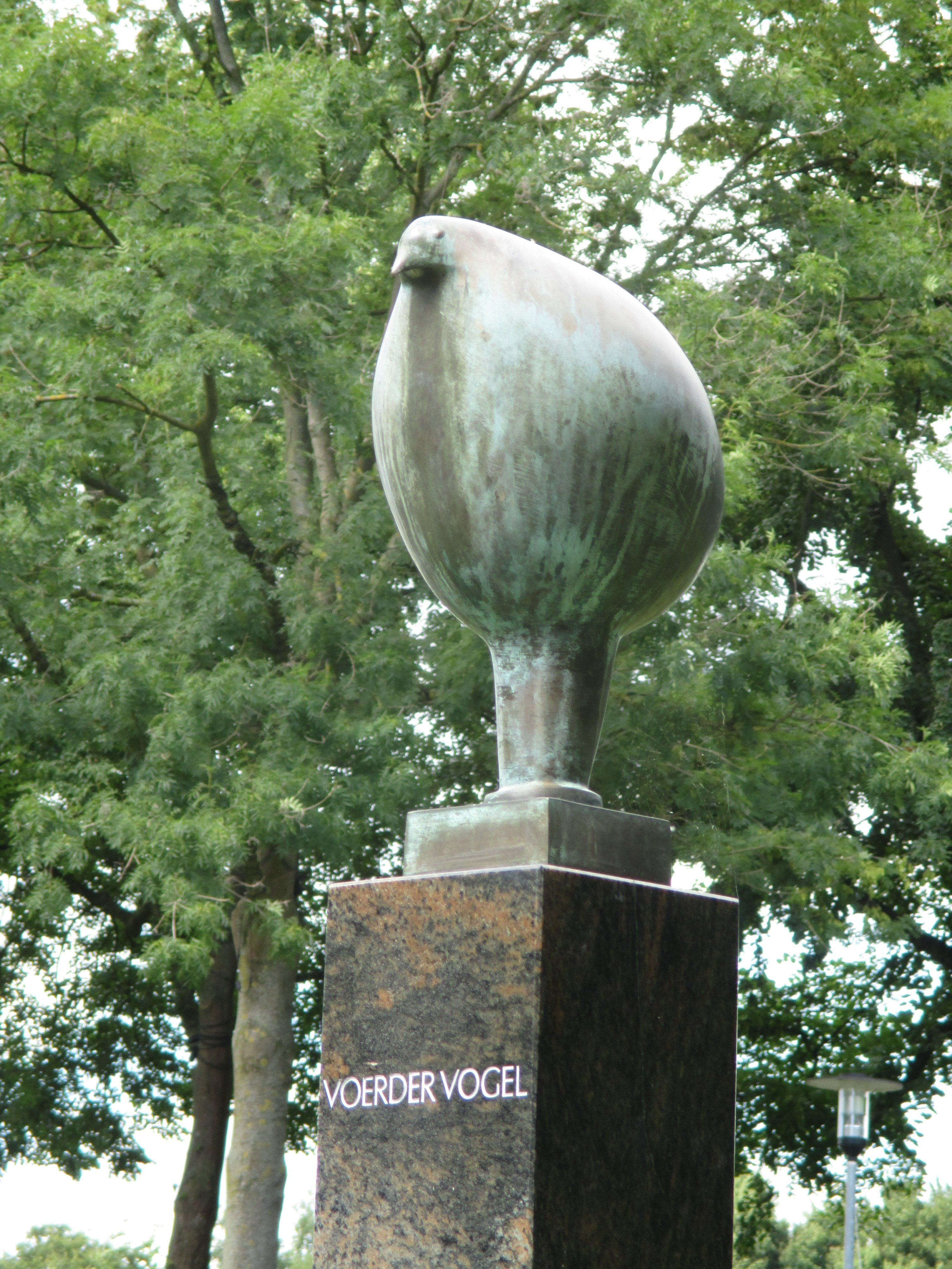 Der Voerder Vogel von Gerhard Finke am Wasserschloss Haus Voerde ist den Chören und Gesangsvereinen des Sängerbezirks Voerde gewidmet. Er wurde 2001 aufgestellt. Der Vogel ist eines der Wappensymbole alter Geschlechter und Familien aus dem Voerder Gebiet.